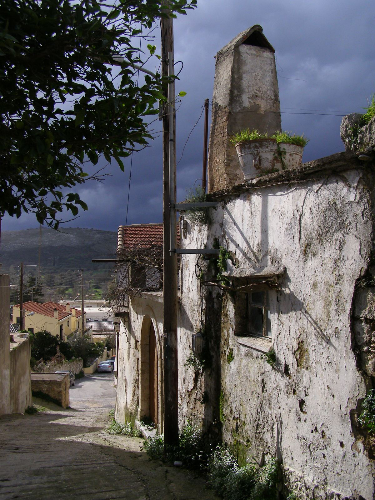 Ruine im östlichen Teil von Armeni, Kreta